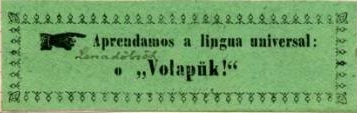 Selo de promoção da língua universal Volapük, de 1891.